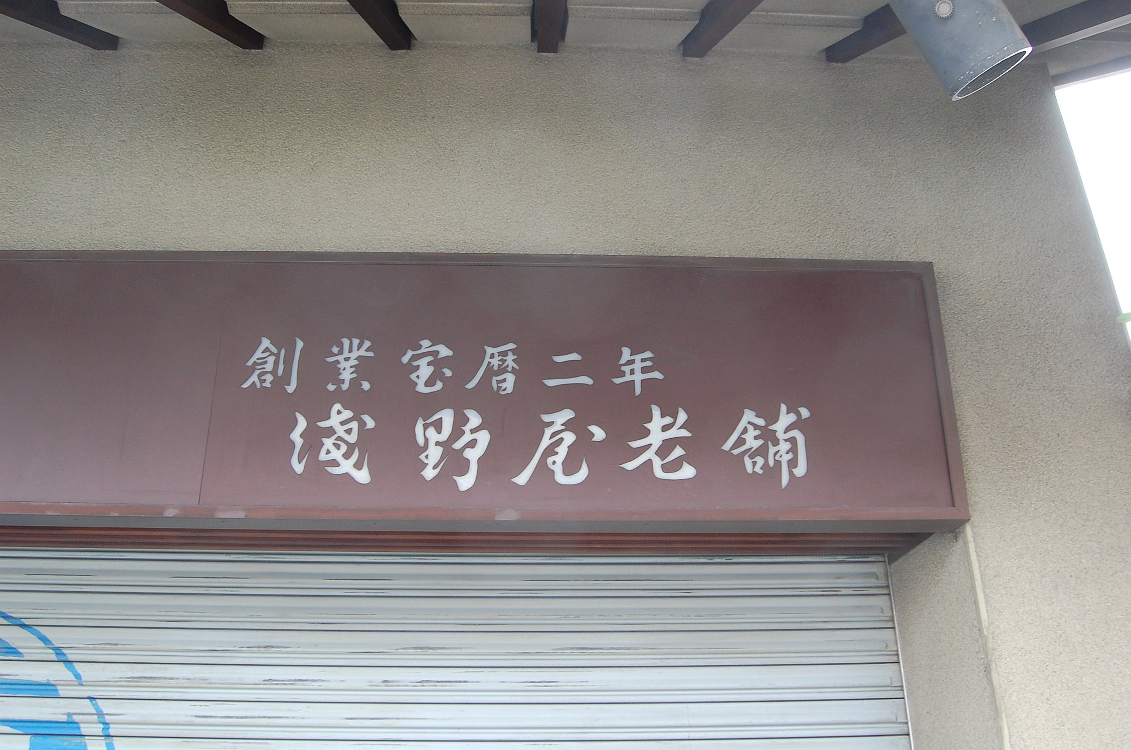 創業宝暦二年(西暦1752年)